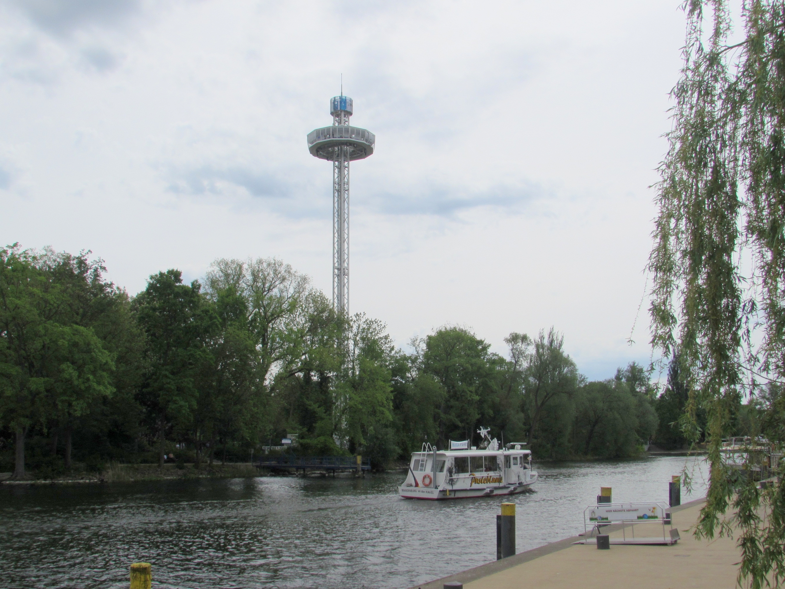 buga-skyliner und bugafähre pusteblume in brandenburg